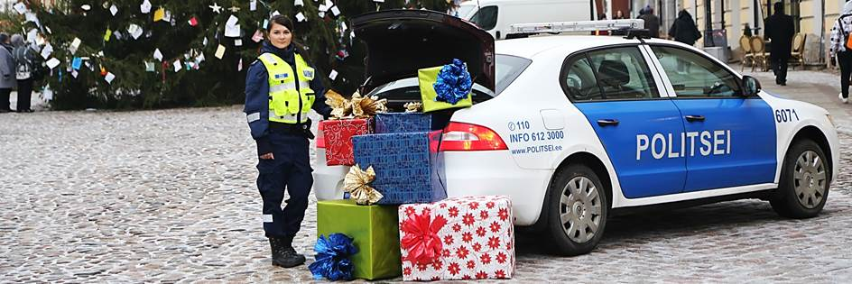 Lõuna prefektuur